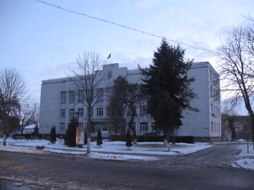 Теребовлянська районна рада та адміністрація